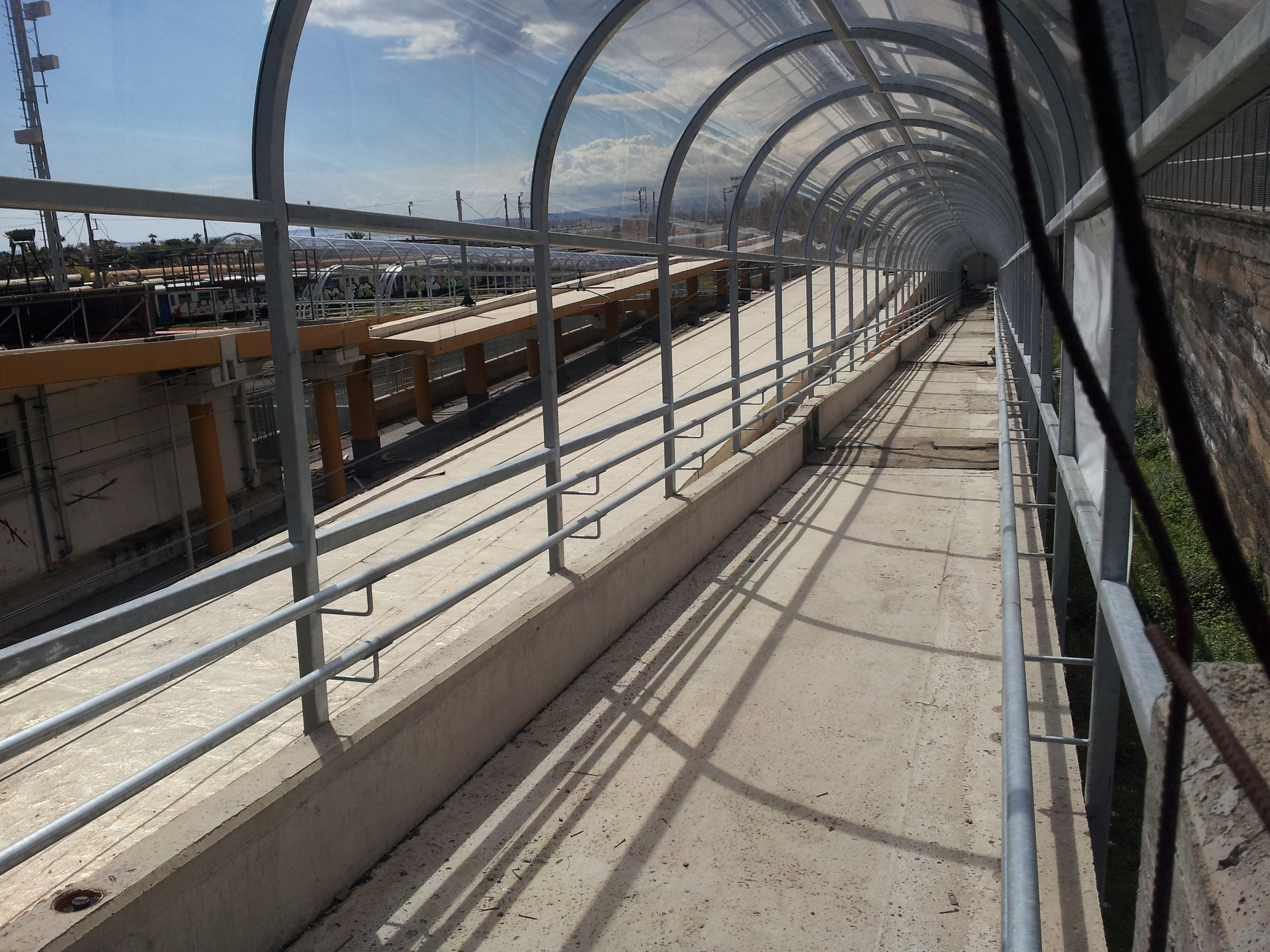 Catania, vista dall'alto della stazione di Europa.